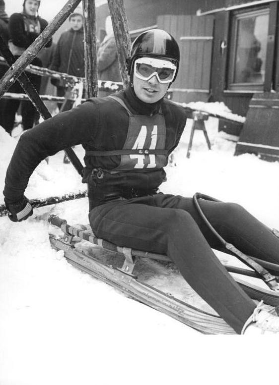 Klaus Bonsack Zentralbild Studre´ Pr-15.2.1965-Deutsche Meisterschaften im Rennschlitten am 14.2.1965 in Oberhof-Im Herren-Einer konnte sich Klaus Bonsack (SC Traktor Oberwiesenthal) den Meistertitel erkämpfen.